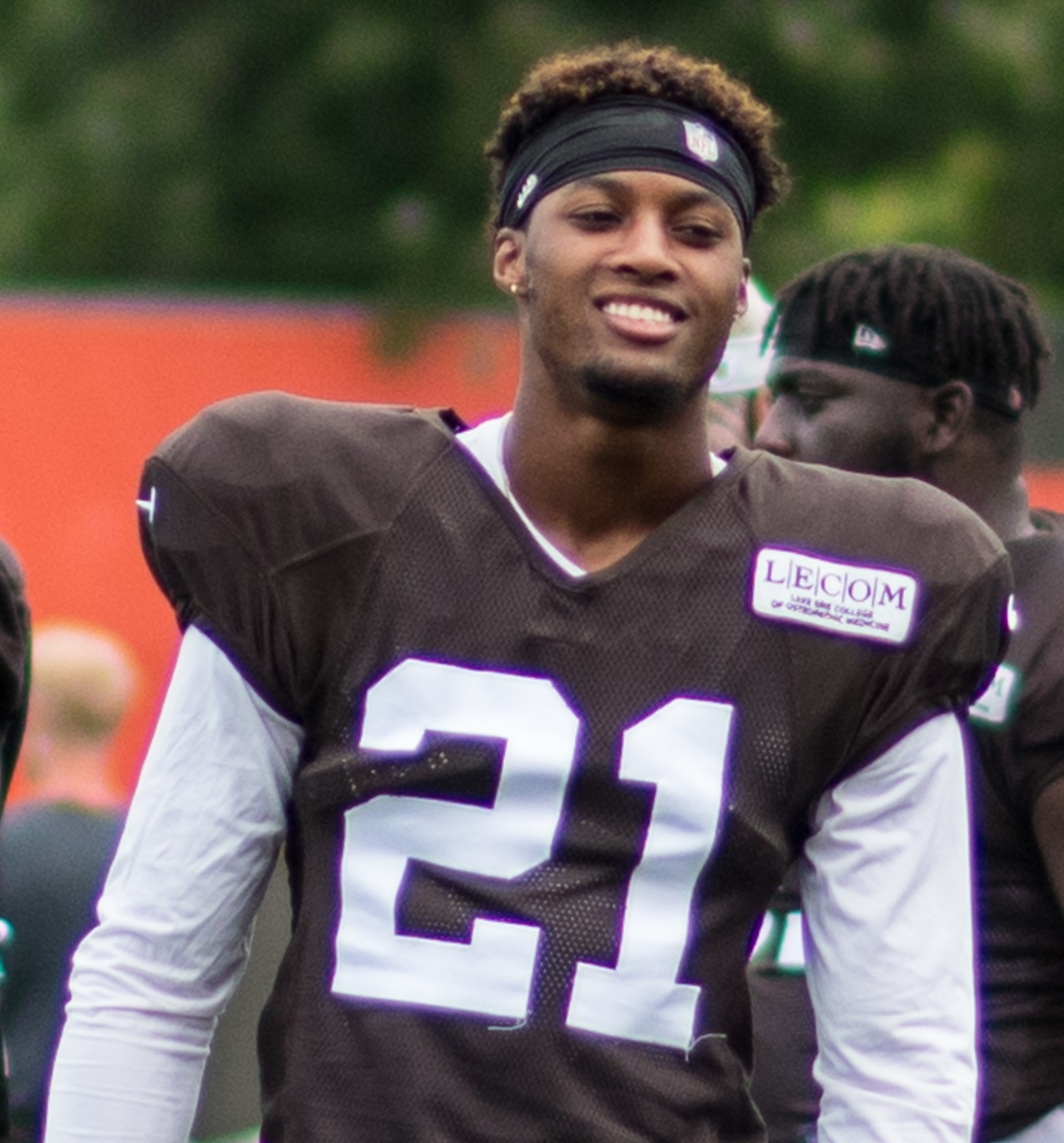 Denzel Ward